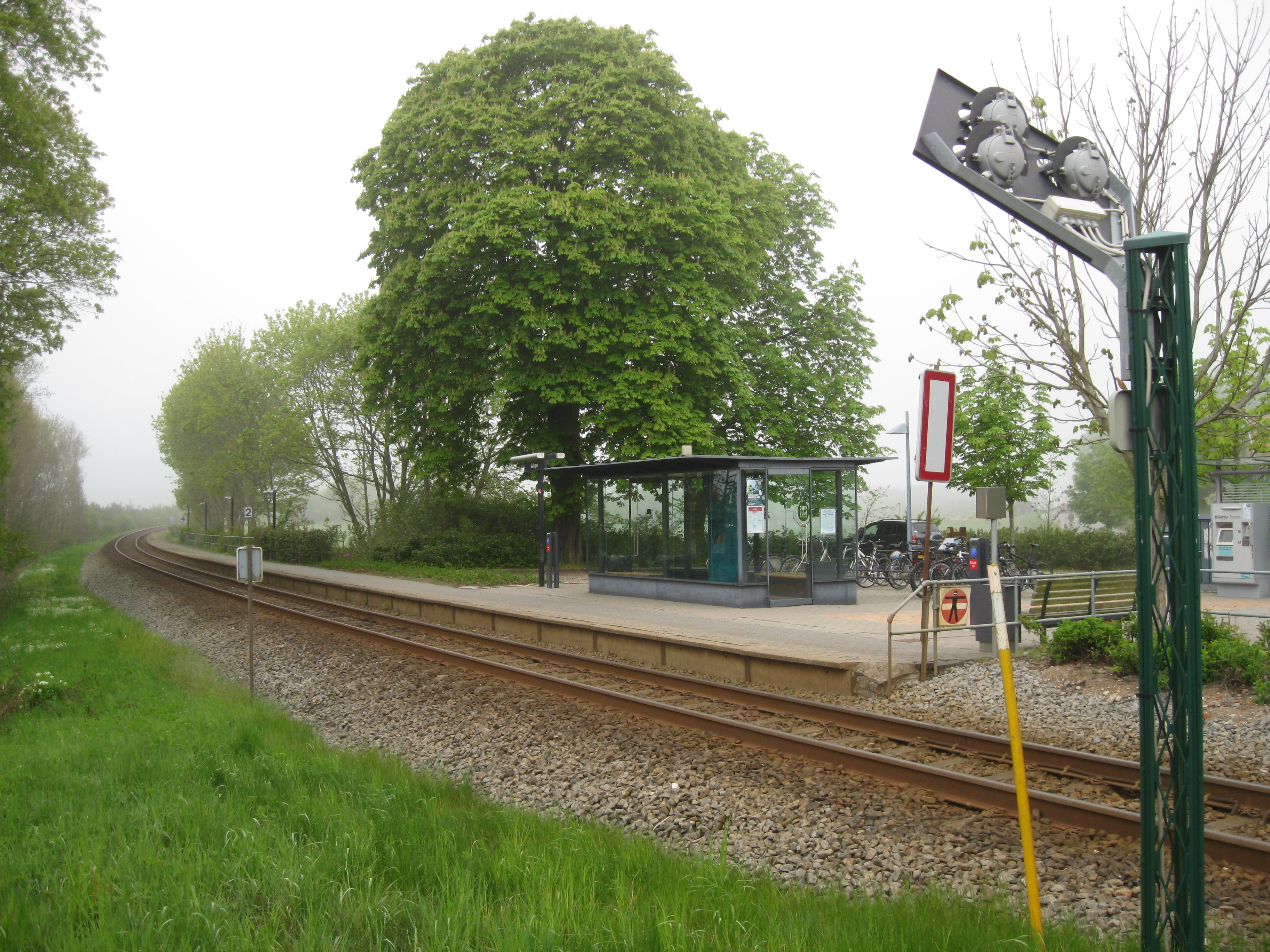 Alken Station